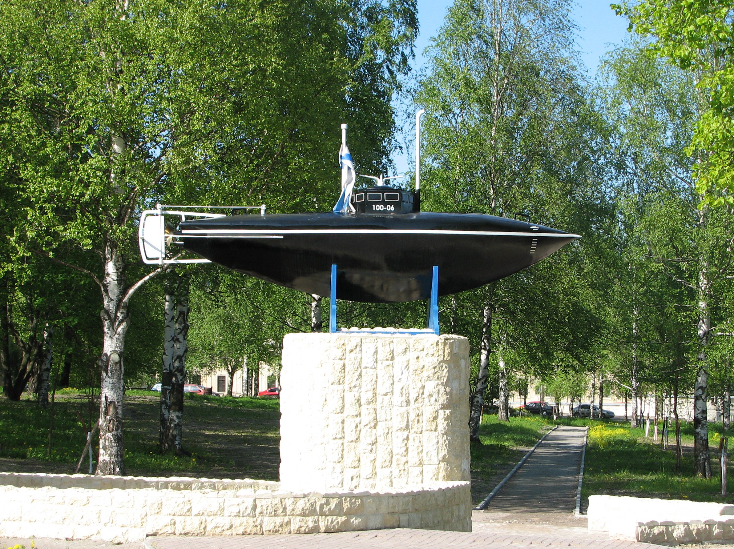 Подводная лодка Степана Карловича Джевецкого. Памятник в Гатчине